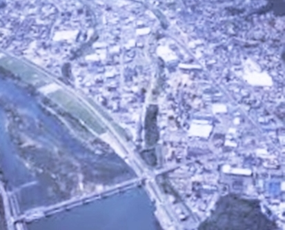 八木城址（右下の小高い山）